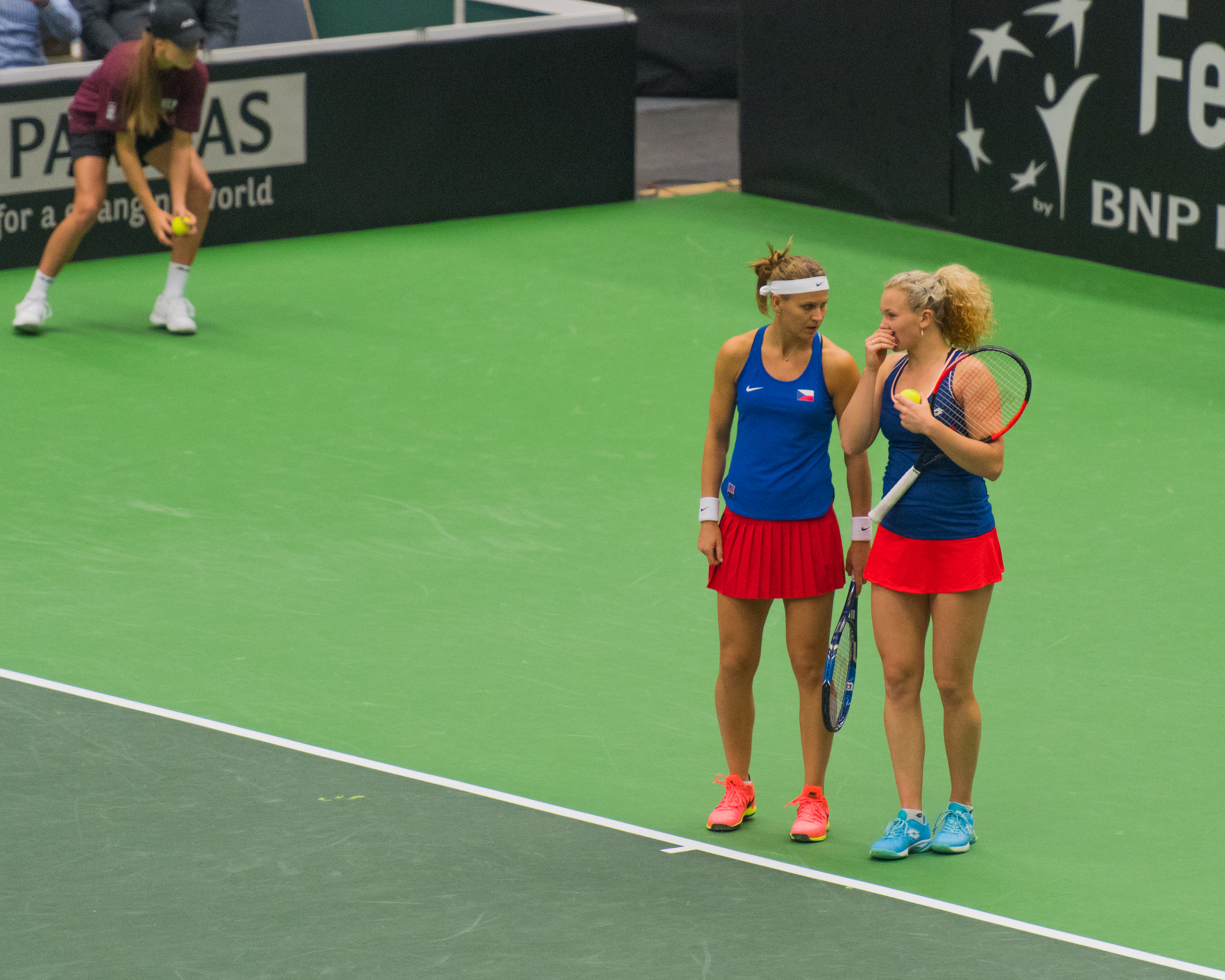 PPP_0628